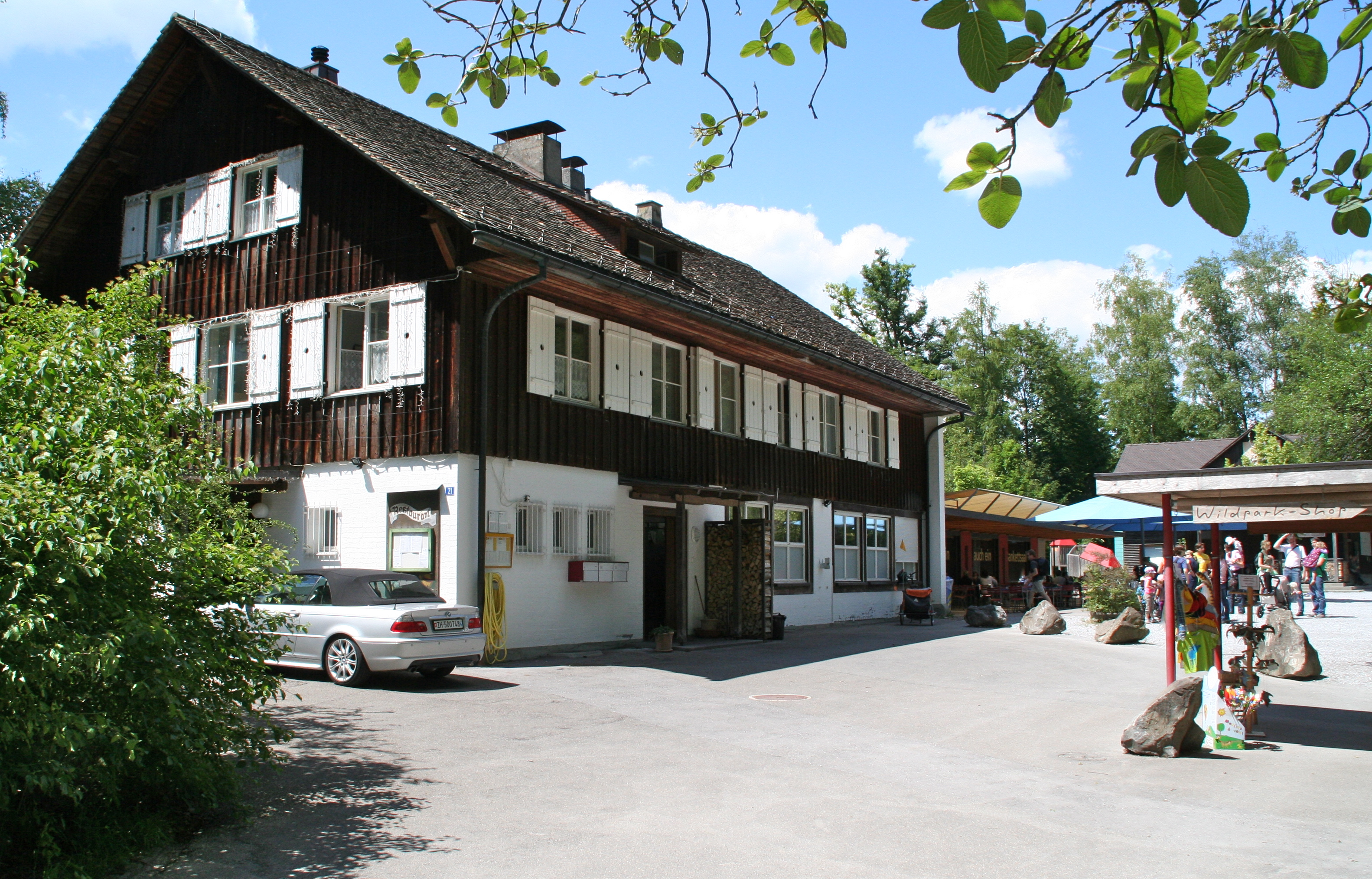 Wildpark Langenberg Restaurant 2011